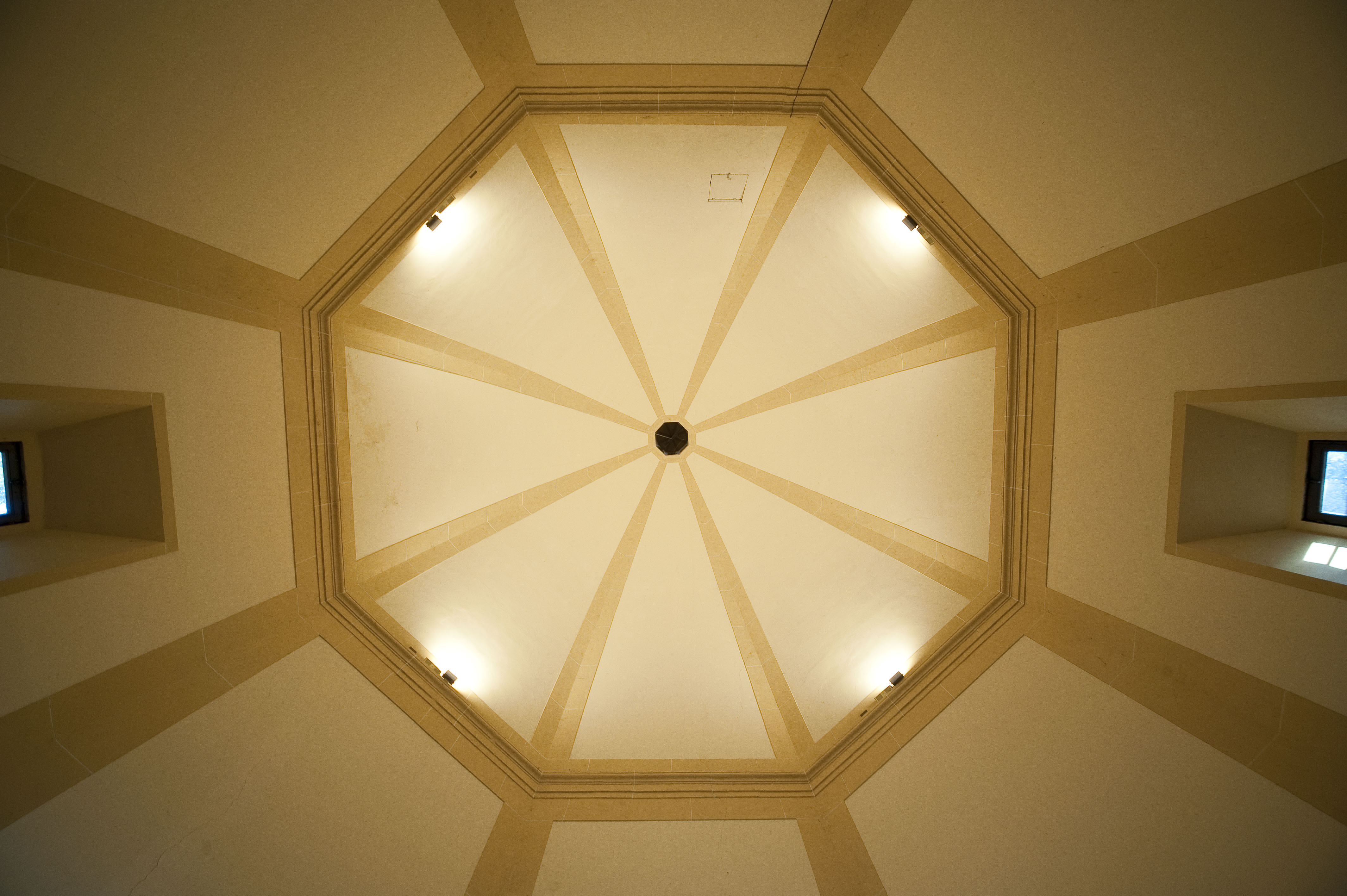 Interno della cupola della Cappella di San Michele arcangelo a Semifonte (Barberino Val d'Elsa)